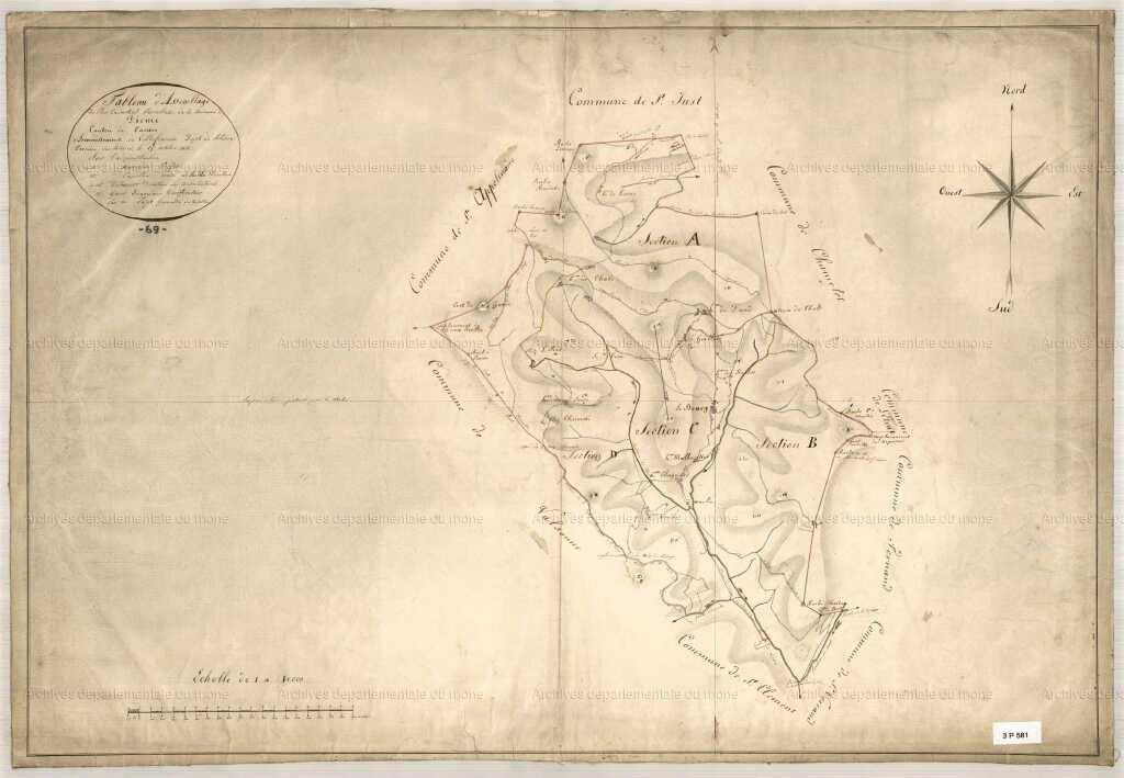 Archives du département du Rhône et de la métropole de Lyon, 3P581